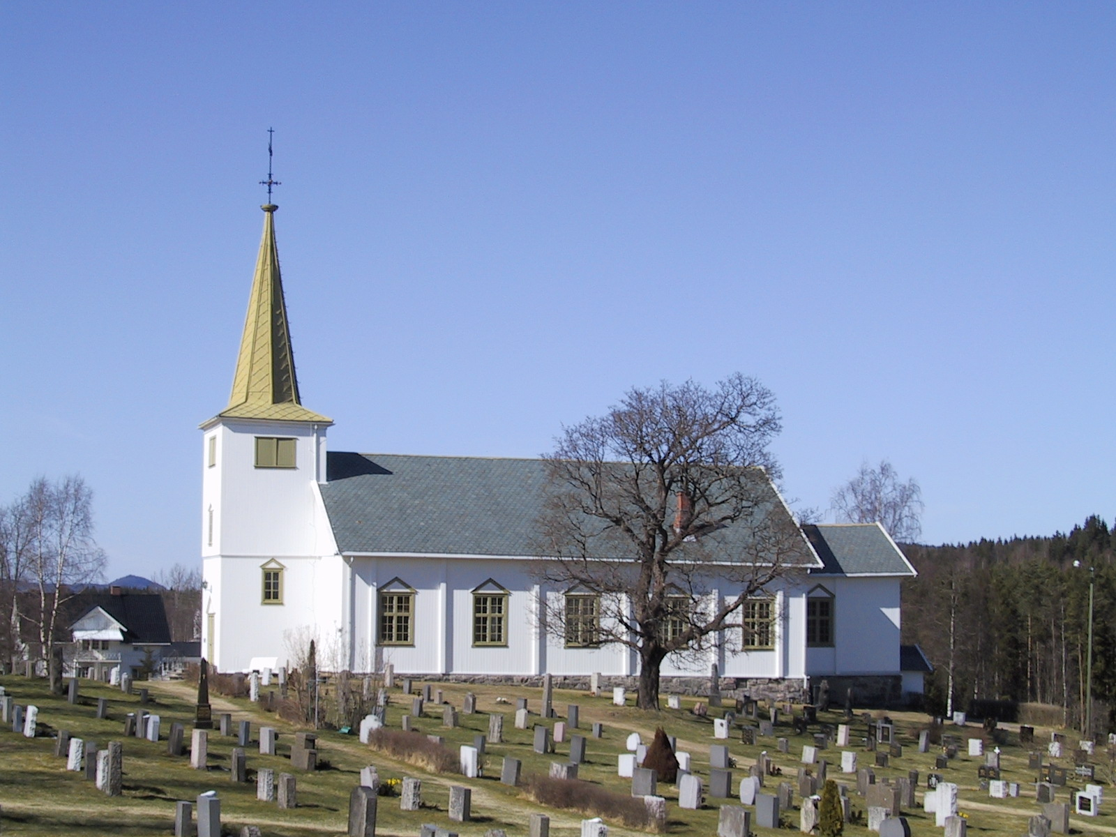 Austmarka kirke i Kongsvinger